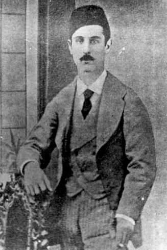 Ismail Bey Gaspirali in 1872 uit Shura, Orenburg. Auteursrecht reeds lang vervallen